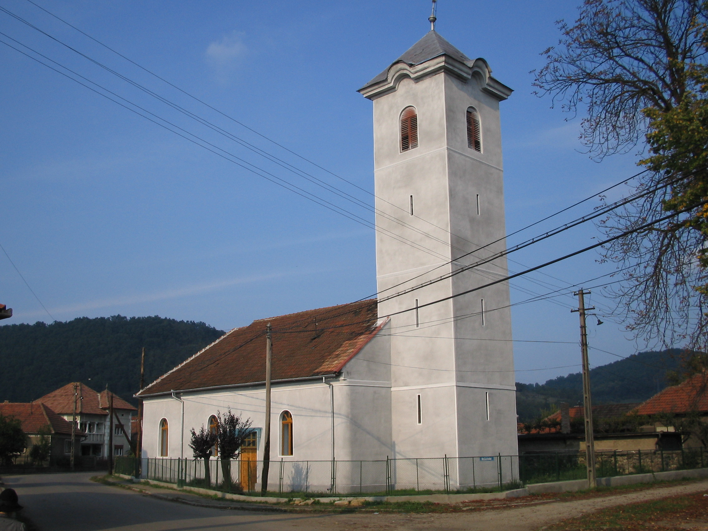 Biserica Reformata de pe str. Horia din Brad